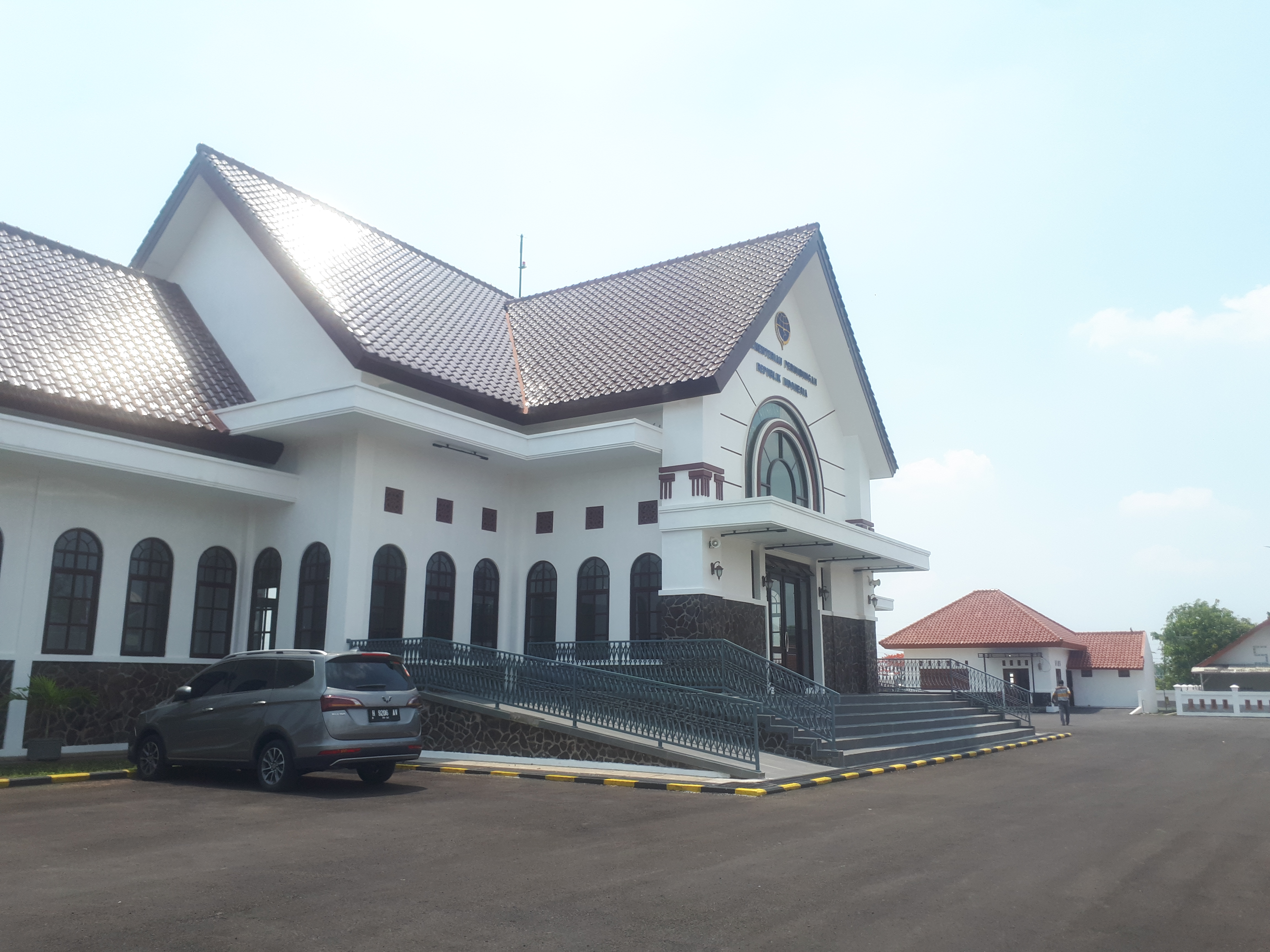 Stasiun Sukomoro Baru mulai beroperasi pada 14 Maret 2019 bersamaan dengan aktivasi rel jalur ganda Stasiun Babadan dan Stasiun Nganjuk.